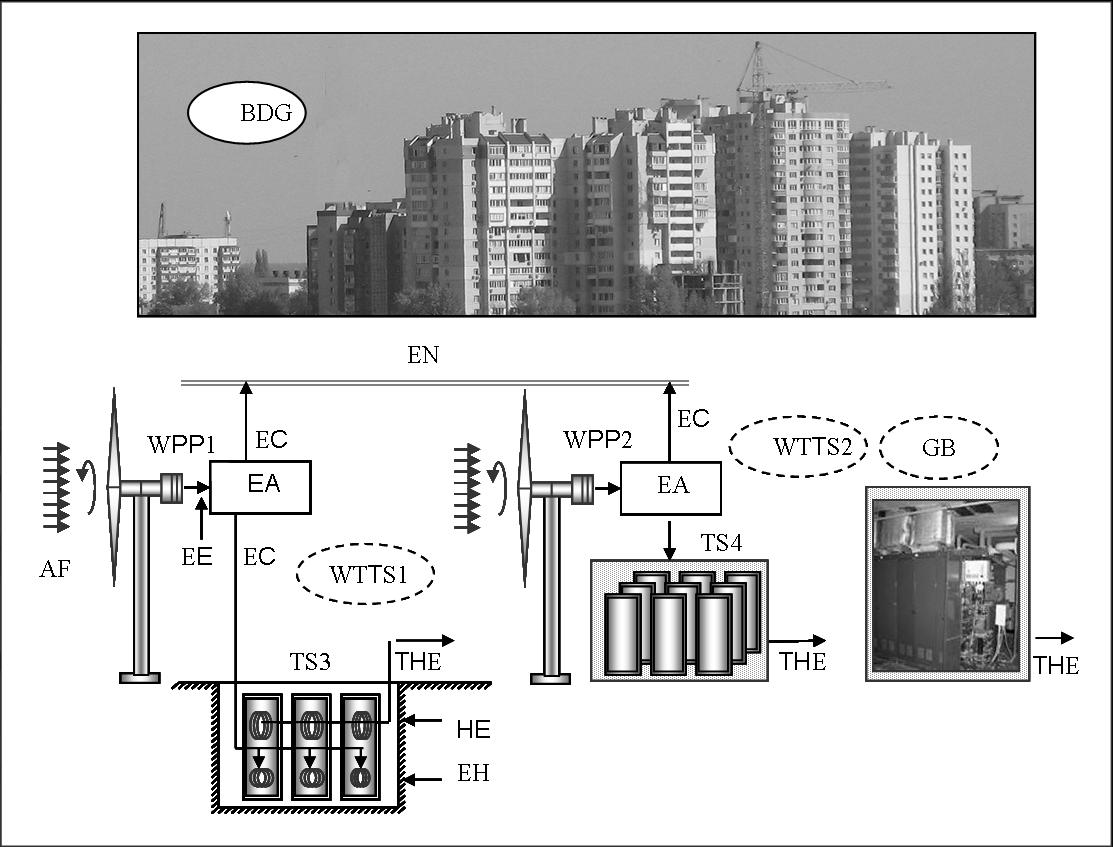 Багатосекційна вітротурбінна система теплопостачання мікрорайону